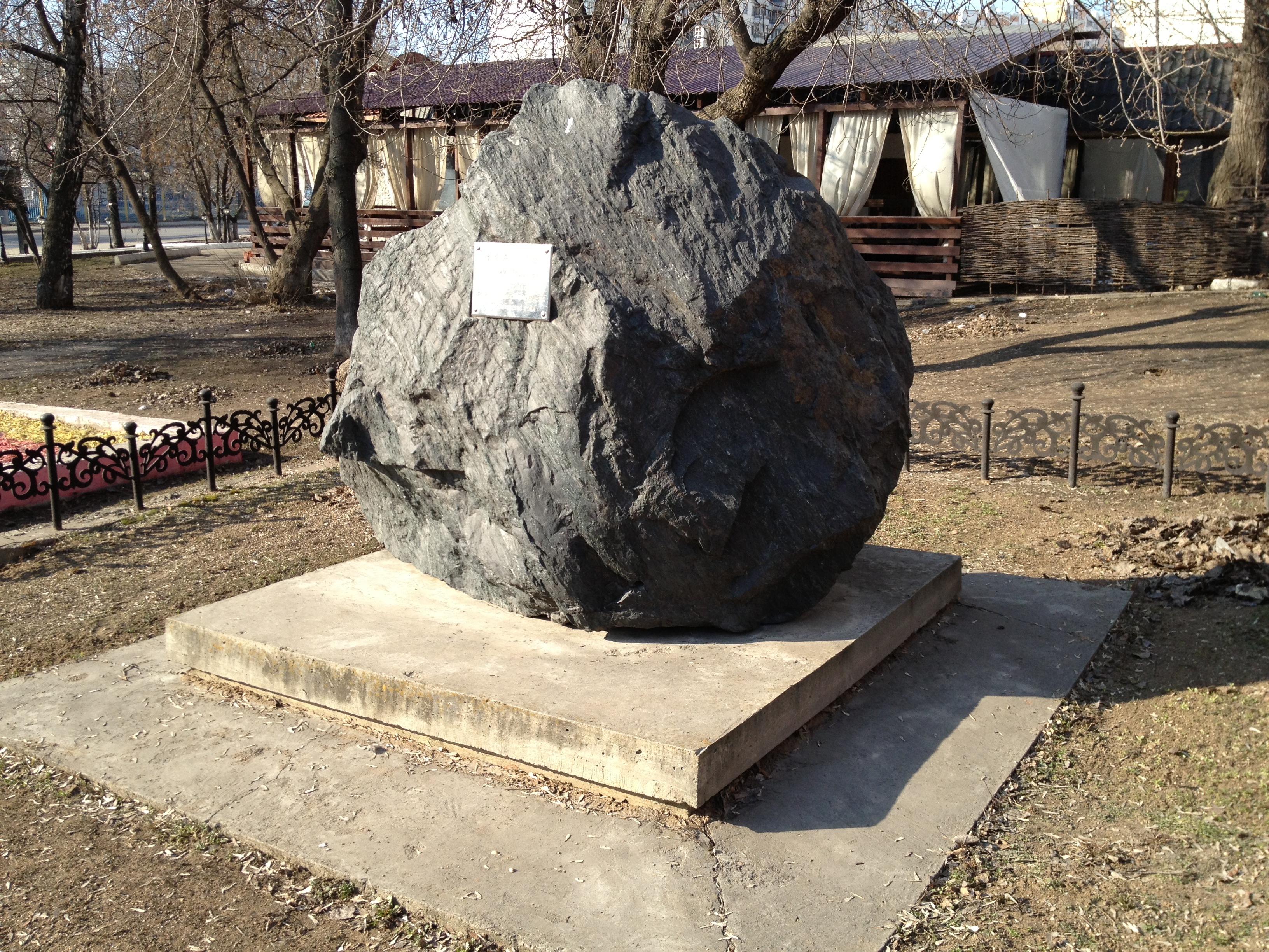 Мемориальный камень-глыба на краю Ходынского поля